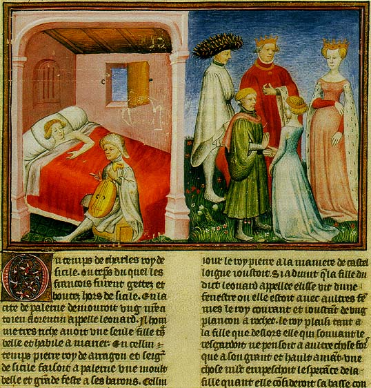 Decameron